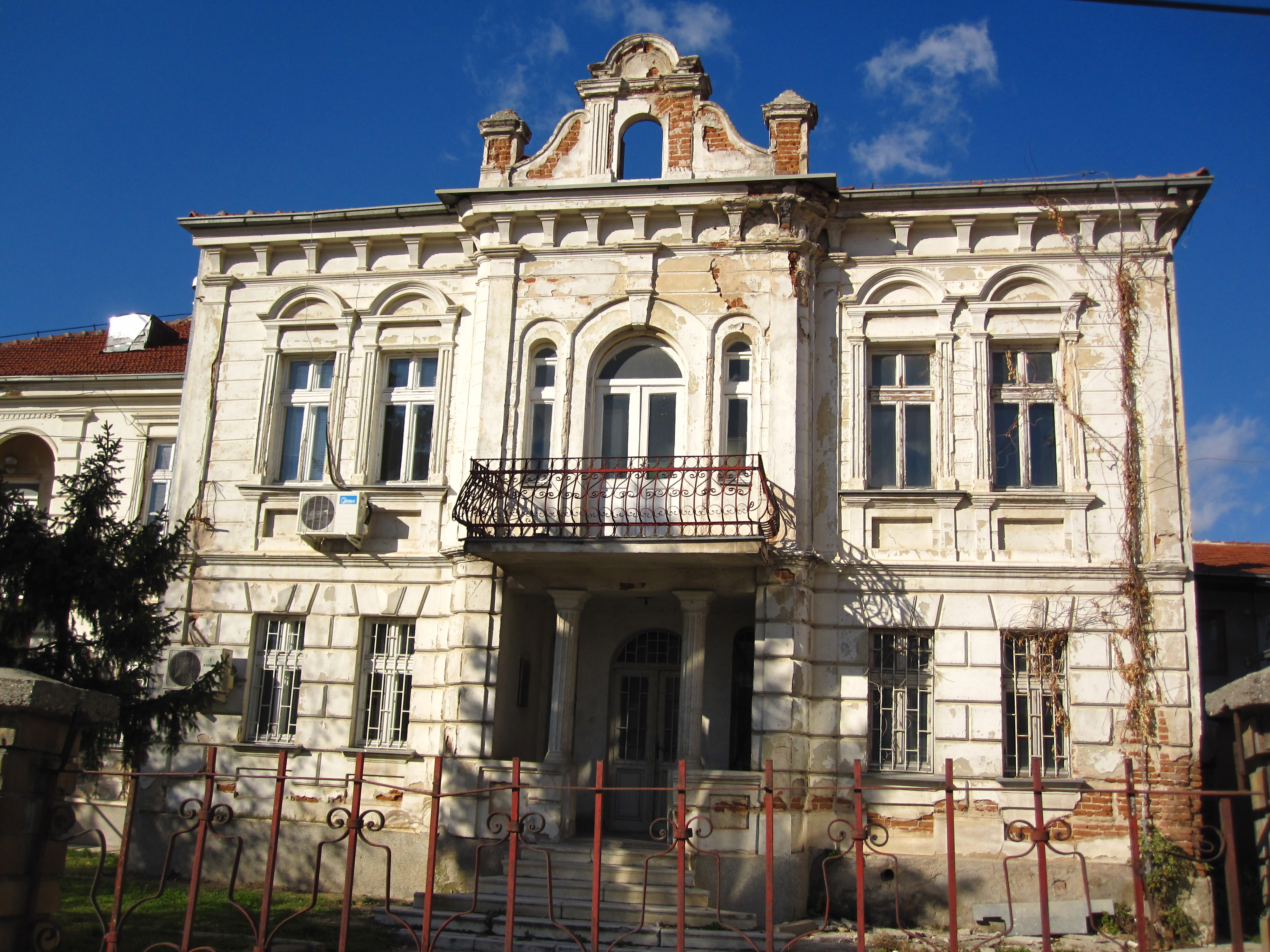 Катастар - Прилеп